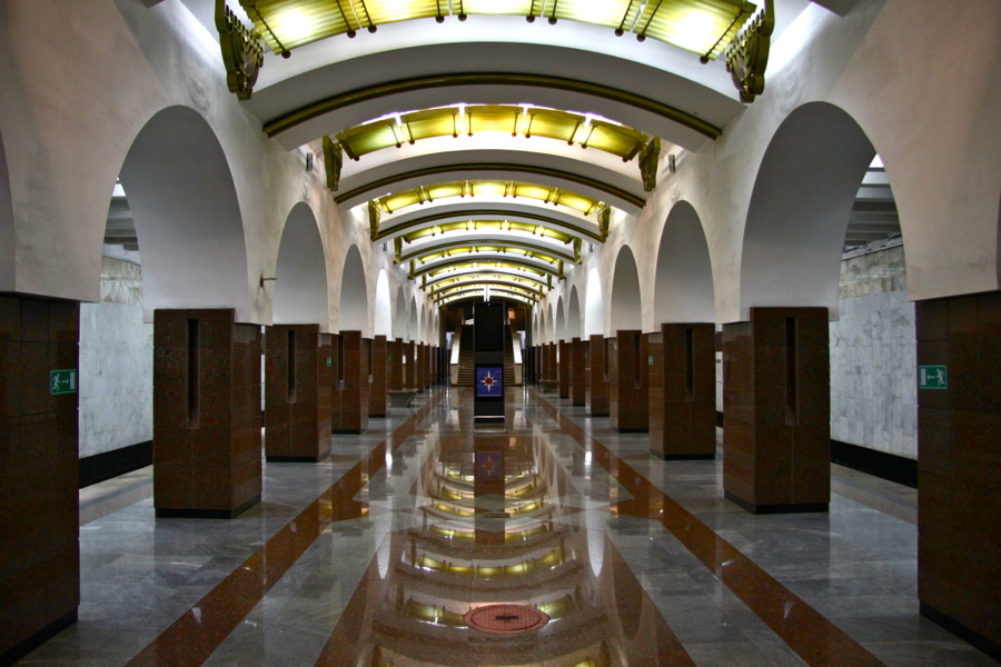 Samara Metro (Самарский метрополитен)